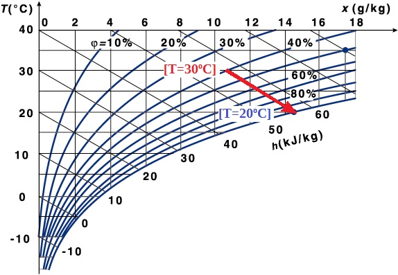 Przebieg chłodzenia ewaporacyjnego bezpośredniego